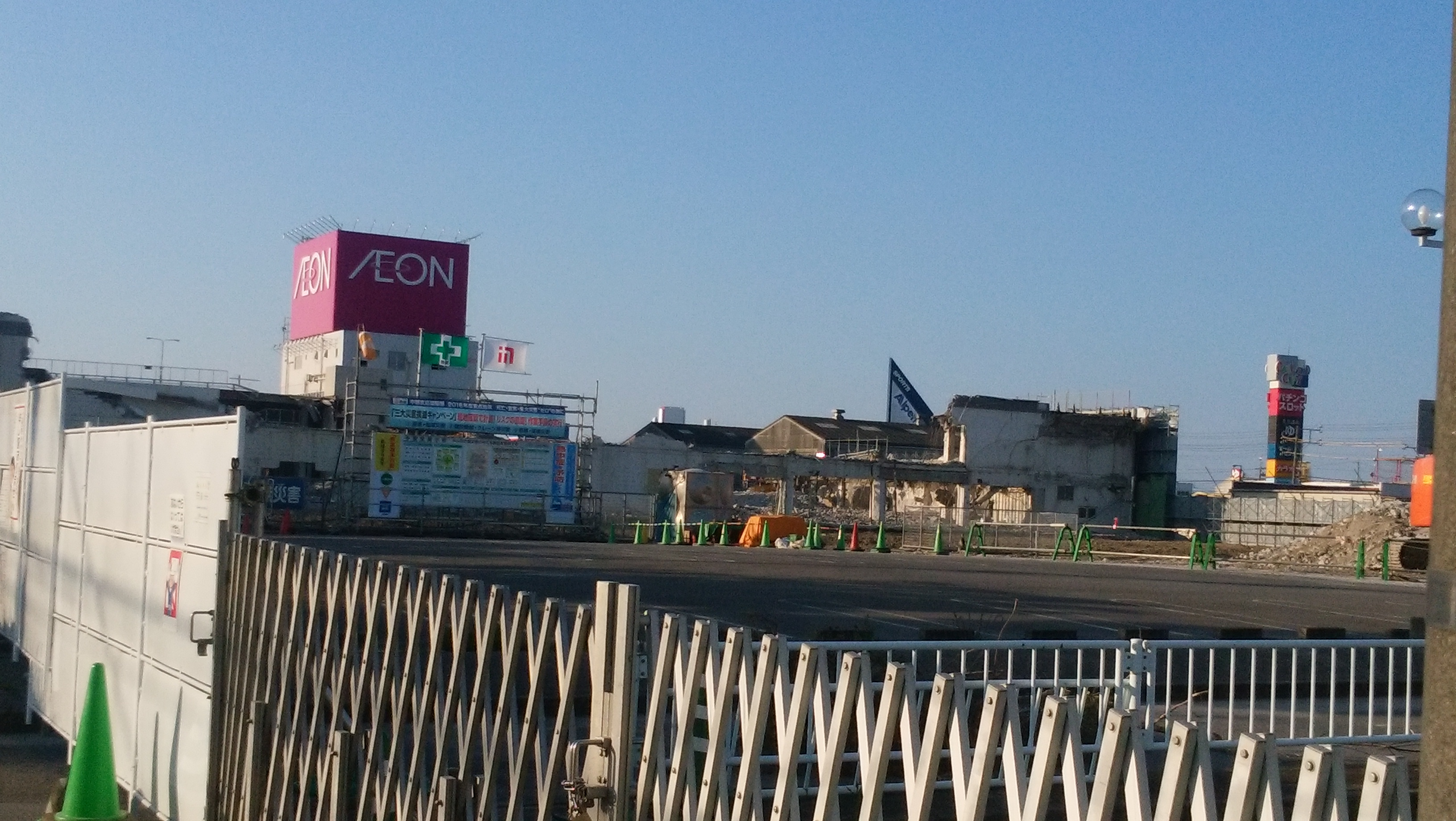 「イオン津南ショッピングセンター サンバレー」の解体中の様子です（2016年7月18日撮影）。